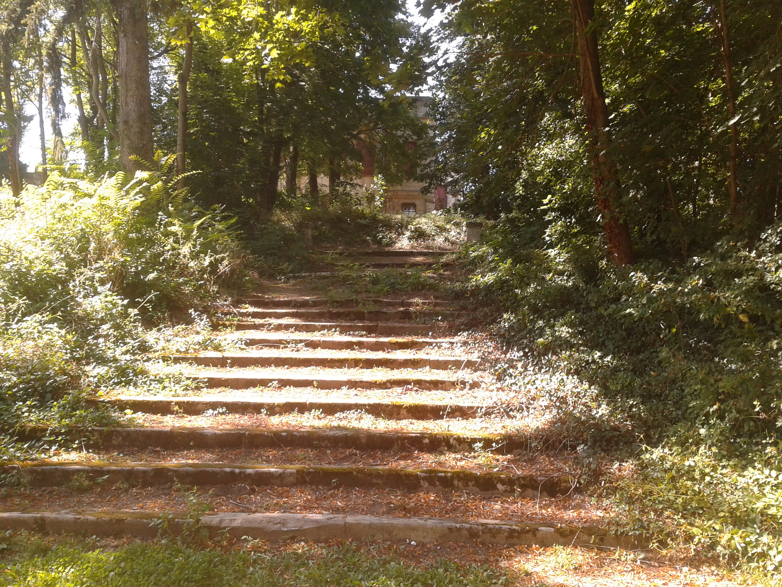 façade nord du château prise depuise la serre